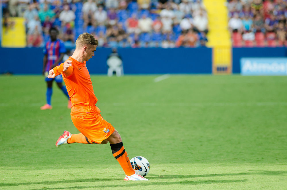 Imatges del partit Llevant - Real Societat